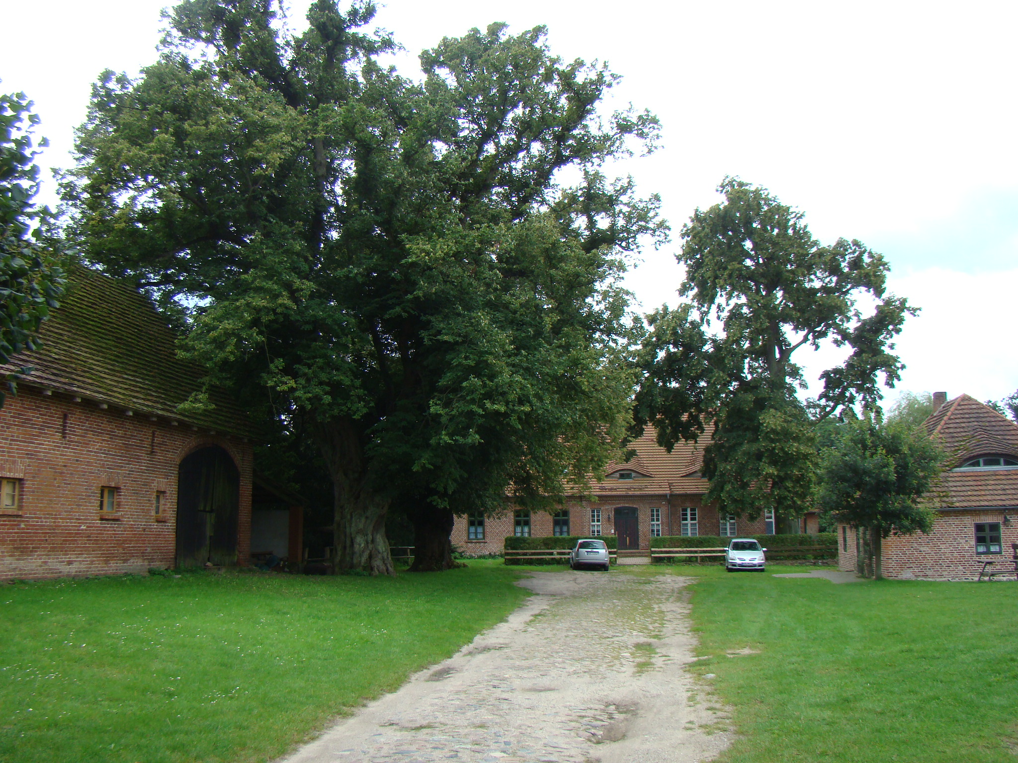 Pfarrhaus in Jabel, errichtet 1824.